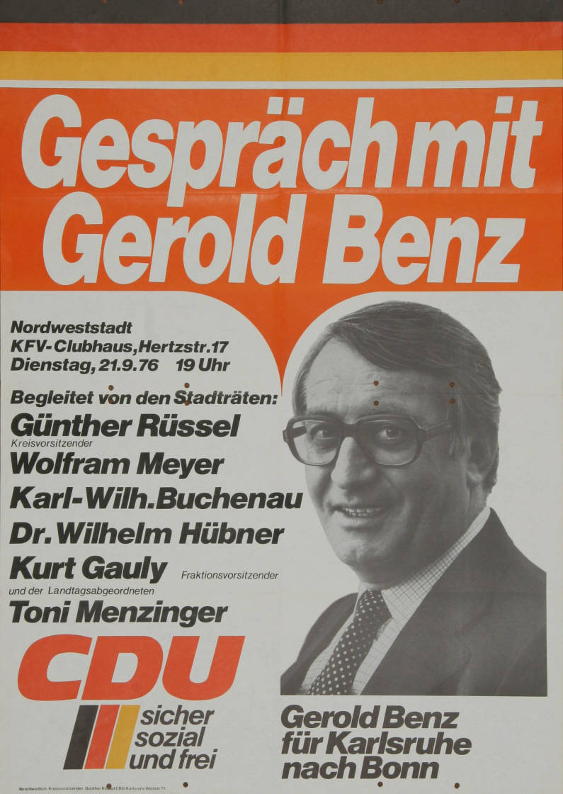 Gespräch mit Gerold Benz ... Begleitet von den Stadträten: Günther Rüssel Kreisvorsitzender Wolfram Meyer Karl-Wilh. Buchenau Dr. Wilhelm Hübner Kurt Gauly Fraktionsvorsitzender und der Landtagsabgeordneten Toni Menzinger Gerold Benz für Karlsruhe nach Bonn CDU sicher sozial und frei Abbildung: Porträtfoto Plakatart: Ankündigungsplakat Auftraggeber: Verantw.: Kreisvorsitzender Günther Rüssel, Karlsruhe Objekt-Signatur: 10-001: 2051 Bestand: Plakate zu Bundestagswahlen (10-001) GliederungBestand10-18: Plakate zu Bundestagswahlen (10-001) » Die 8. Bundestagswahl am 3. Oktober 1976 » CDU » Ankündigungsplakate Lizenz: KAS/ACDP 10-001: 2051 CC-BY-SA 3.0 DE